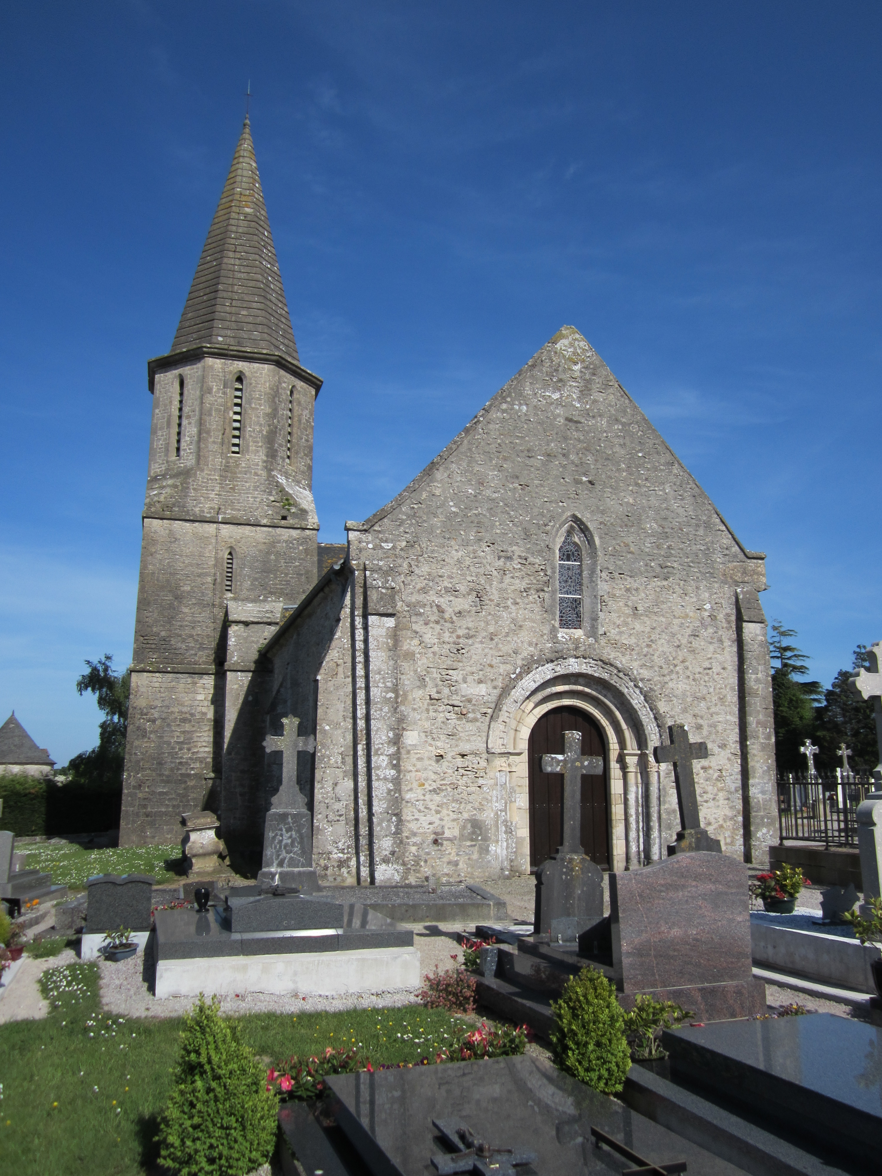 Église Saint Julien d'Urville-Bocage, Manche .